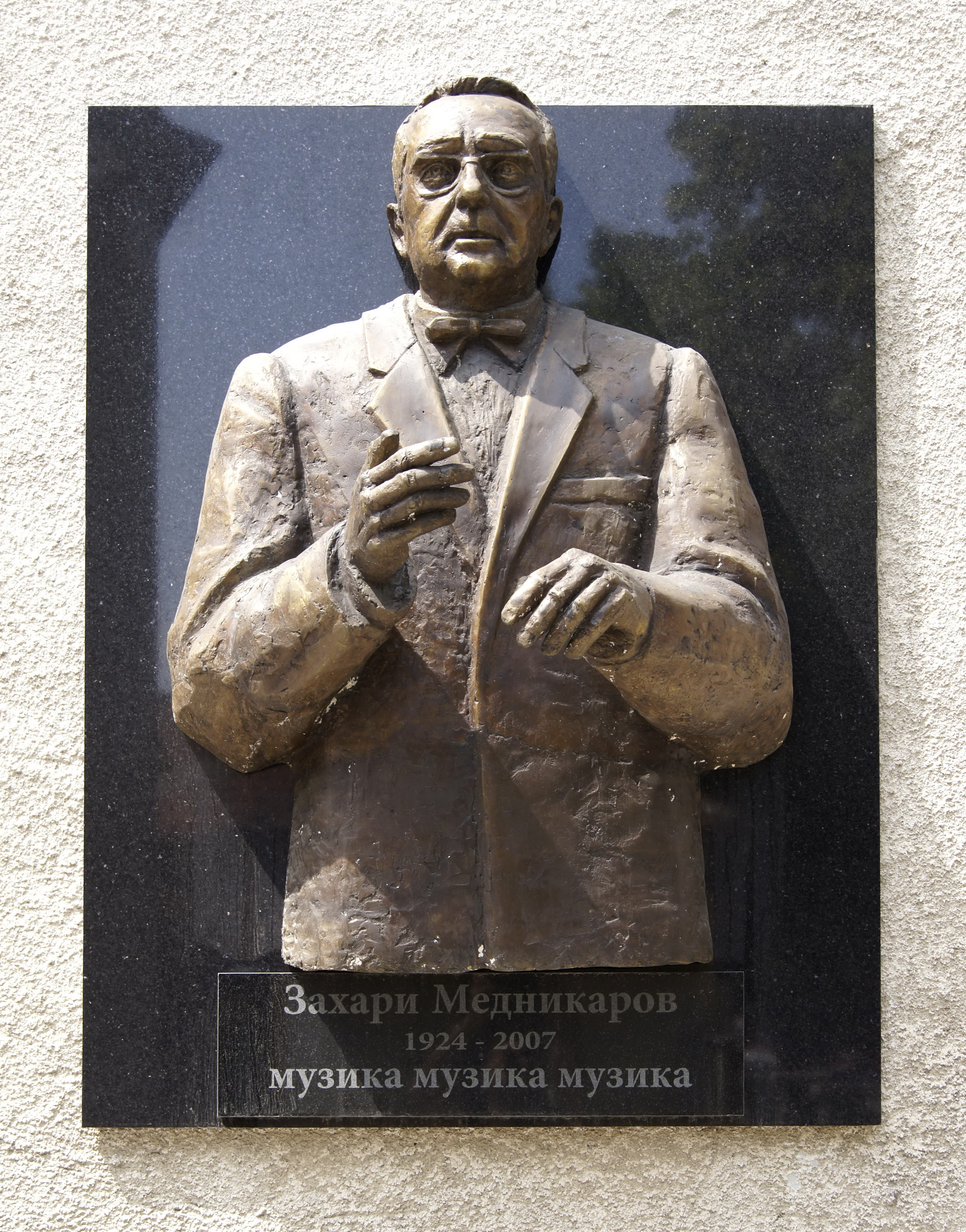 Барелеф на Захари Медникаров в Добрич